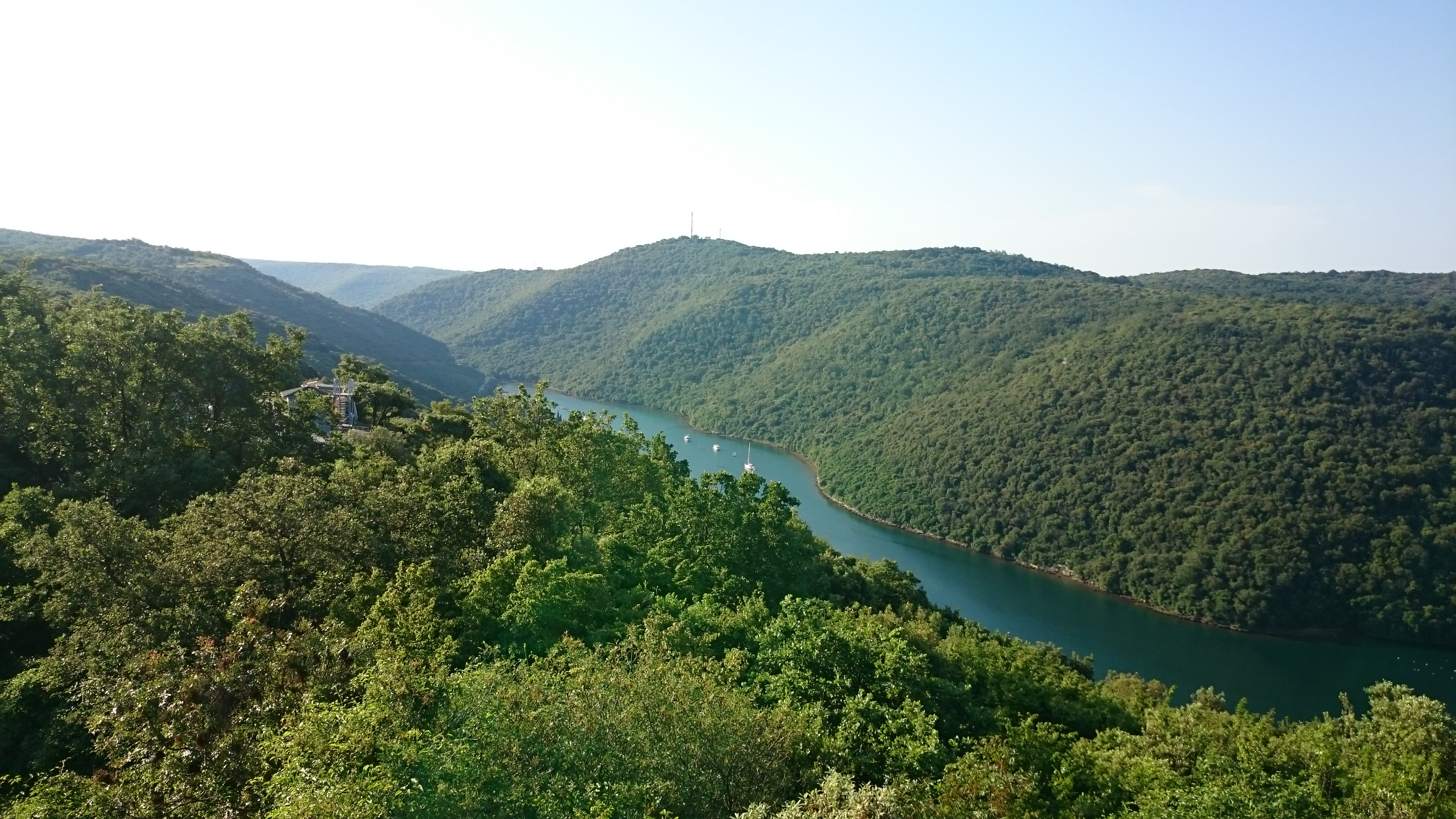 Panoramski posnetek Limskega kanala v Hrvaški Istri.